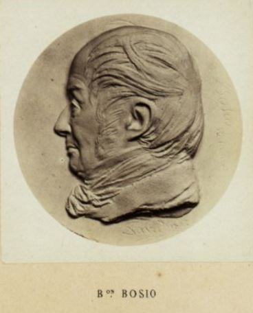 François-Joseph Bosio (1768, 1845, médaillon par David d'Angers in Les médaillons de David d'Angers (1788-1856) réunis et publiés par son fils David d'Angers, Robert (1833-1912). 1867 (BNF, Gallica)